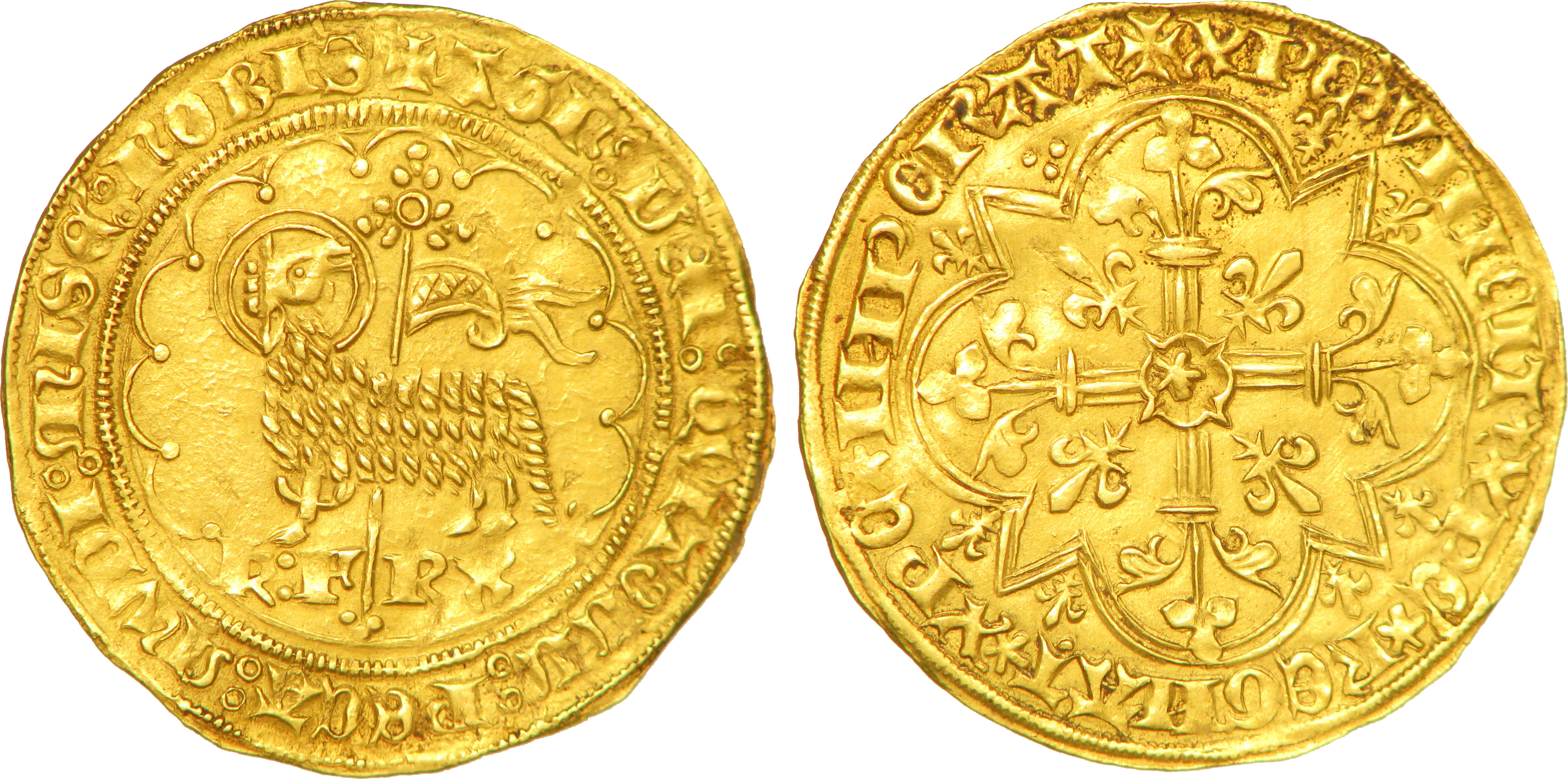 Nom de l'atelier/ville : Paris Métal : or Diamètre : 25mm Axe des coins : 8h. Poids : 2,52g. Titulature avers : + AGn’: DEI: QVI TOLL’: PECA: mVDI: mISE: nOBIS, (M et N onciales, ponctuation par deux annelets superposés). Description avers : Agneau pascal à gauche, une des pattes antérieures relevée, la tête tournée à droite et nimbée, devant une croix tréflée avec un gonfanon qui coupe la légende à l'exergue et repose sur un groupe de trois points, le tout dans un polylobe bouleté interrompu en bas par K: F-RX. Traduction avers : (Charles, roi des Francs ; agneau de Dieu qui enlève les péchés du monde, prends pitié de nous). Titulature revers : + XPC* VINCIT* XPC* REGNAT* XPC* INPERAT, (N romaines et rétrogrades, ponctuation par une rose à cinq pétales). Description revers : Croix trifoliée avec une rose à cinq pétales dans un quadrilobe anglé en cœur, cantonnée de quatre lis, le tout dans un quadrilobe anglé cantonné de sept petits lis et d'un groupe de trois points posés en triangle. Traduction revers : (Le Christ vainc, le Christ règne, le Christ commande).